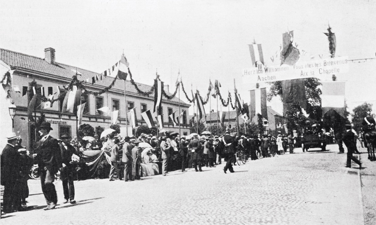 Paris-Berlin 1901 - contrôle d'Aix-la-Chapelle - Le Sport universel illustré du 6 juillet 1901, p.436